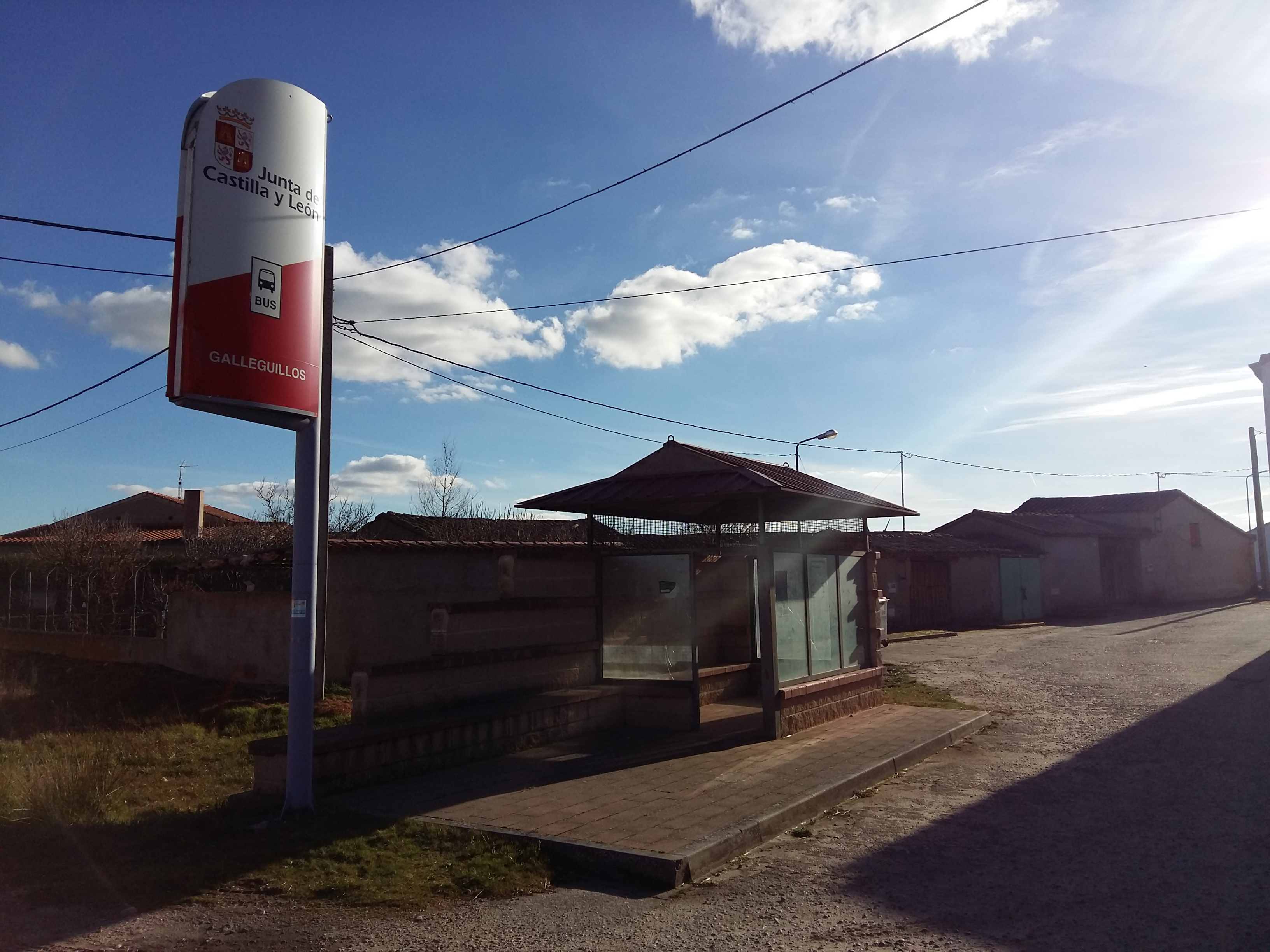 Situada en zona de paso